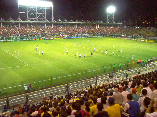 Estadio Raulino de Oliveira 2005-05-08: Fluminense FC 2x1 Cruzeiro EC